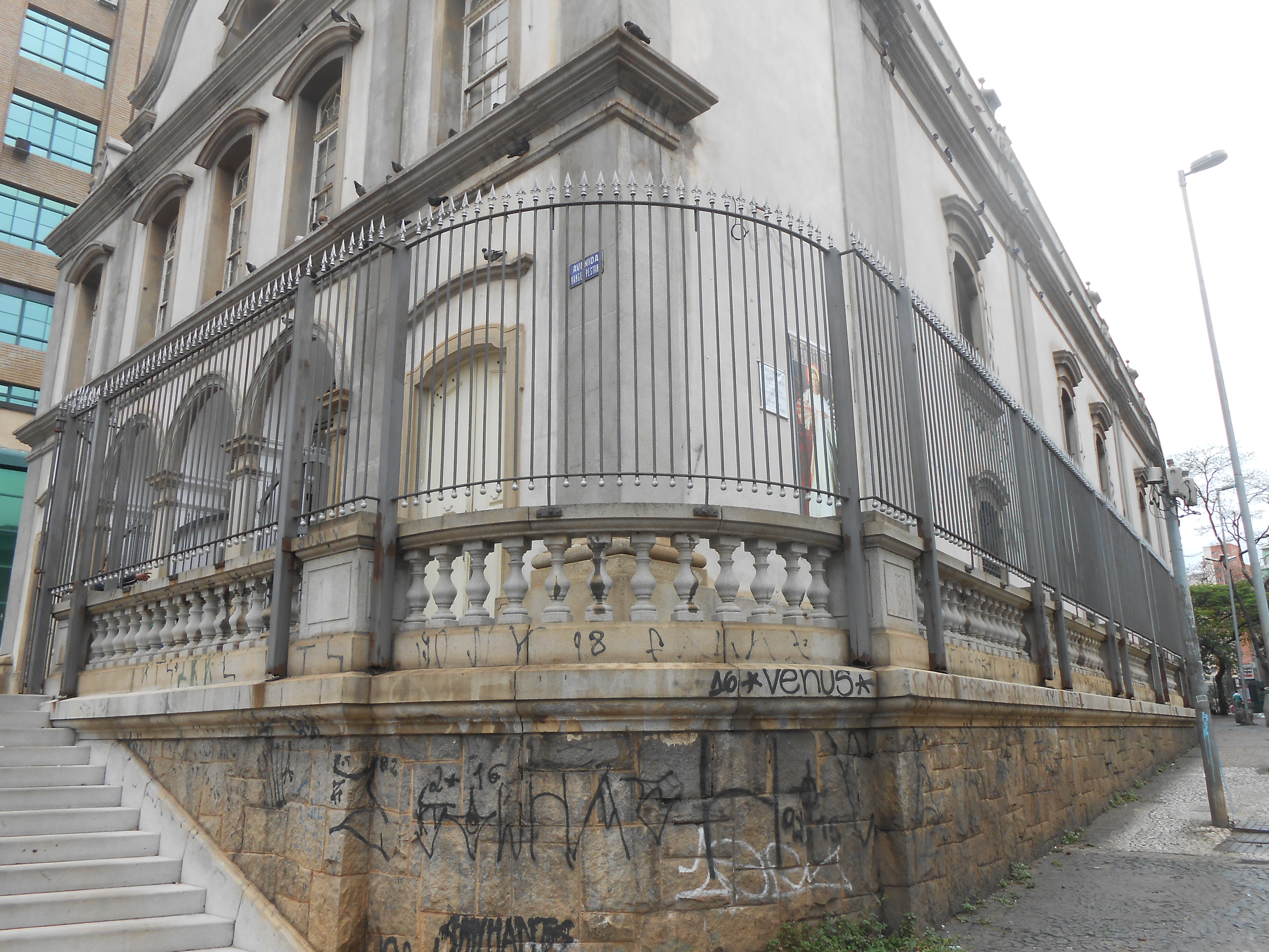 Fachada da Igreja da Ordem Terceira do Carmo, em São Paulo (SP), Brasil. Na foto, é possível observar algumas depredações.